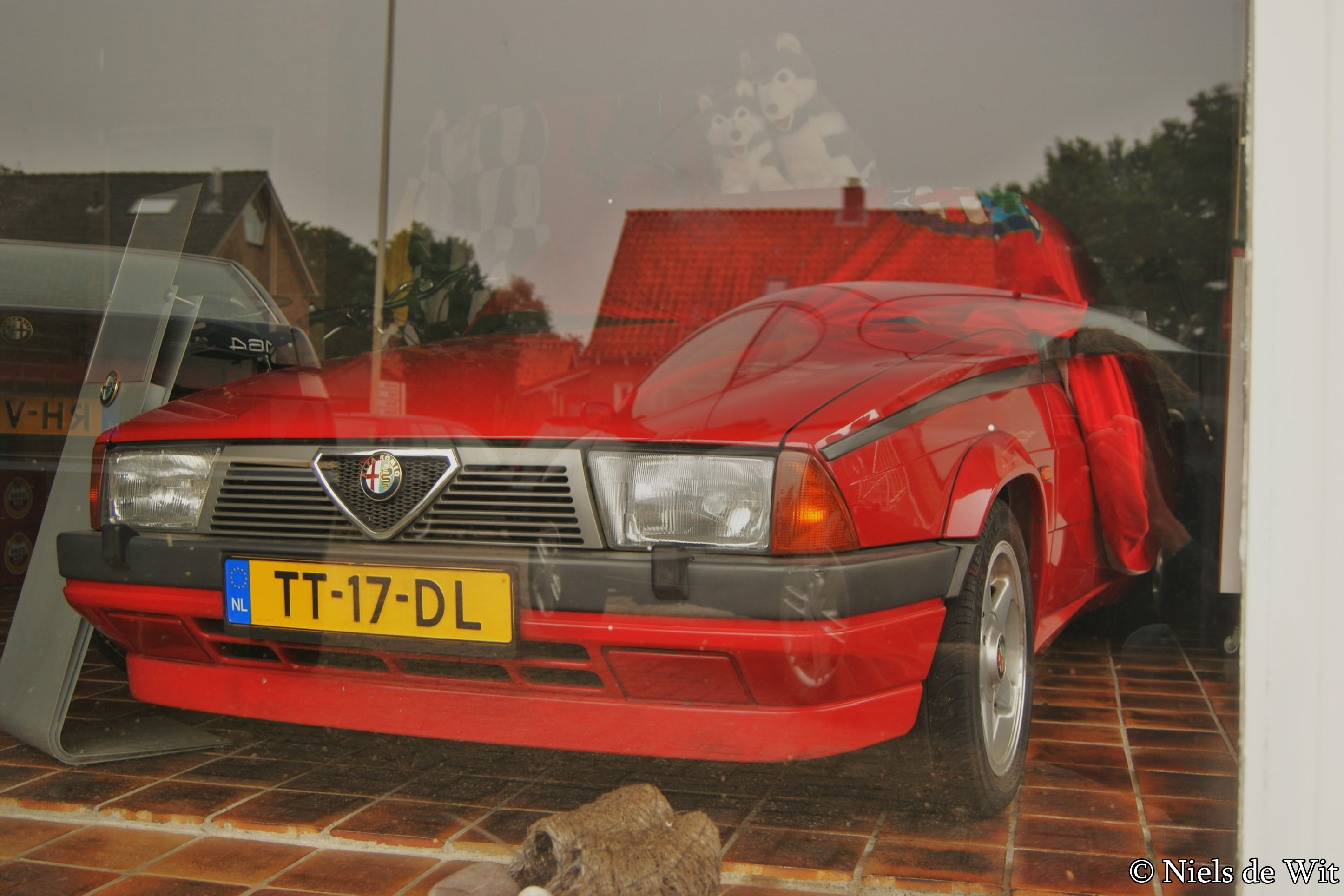 TT-17-DL Auto Heida, Bennekom